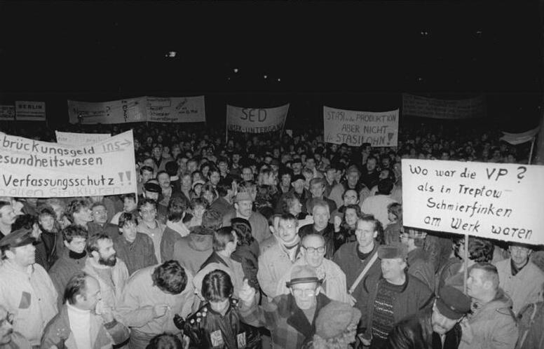 Berlin, Demonstration vor Palast der Republik ADN-ZB Mittelstädt 11.1.90 Berlin: Demonstration- Tausende Anhänger und Sympathisanten oppositioneller Parteien und Gruppierungen bildeten eine Menschenkette um den Palast der Republik. Vor dem Haus der Volkskammer forderten sie mit Transparenten, Losungen und Sprechchören weitere demokratische Veränderungen und protestierten gegen die Politik der SED-PDS.